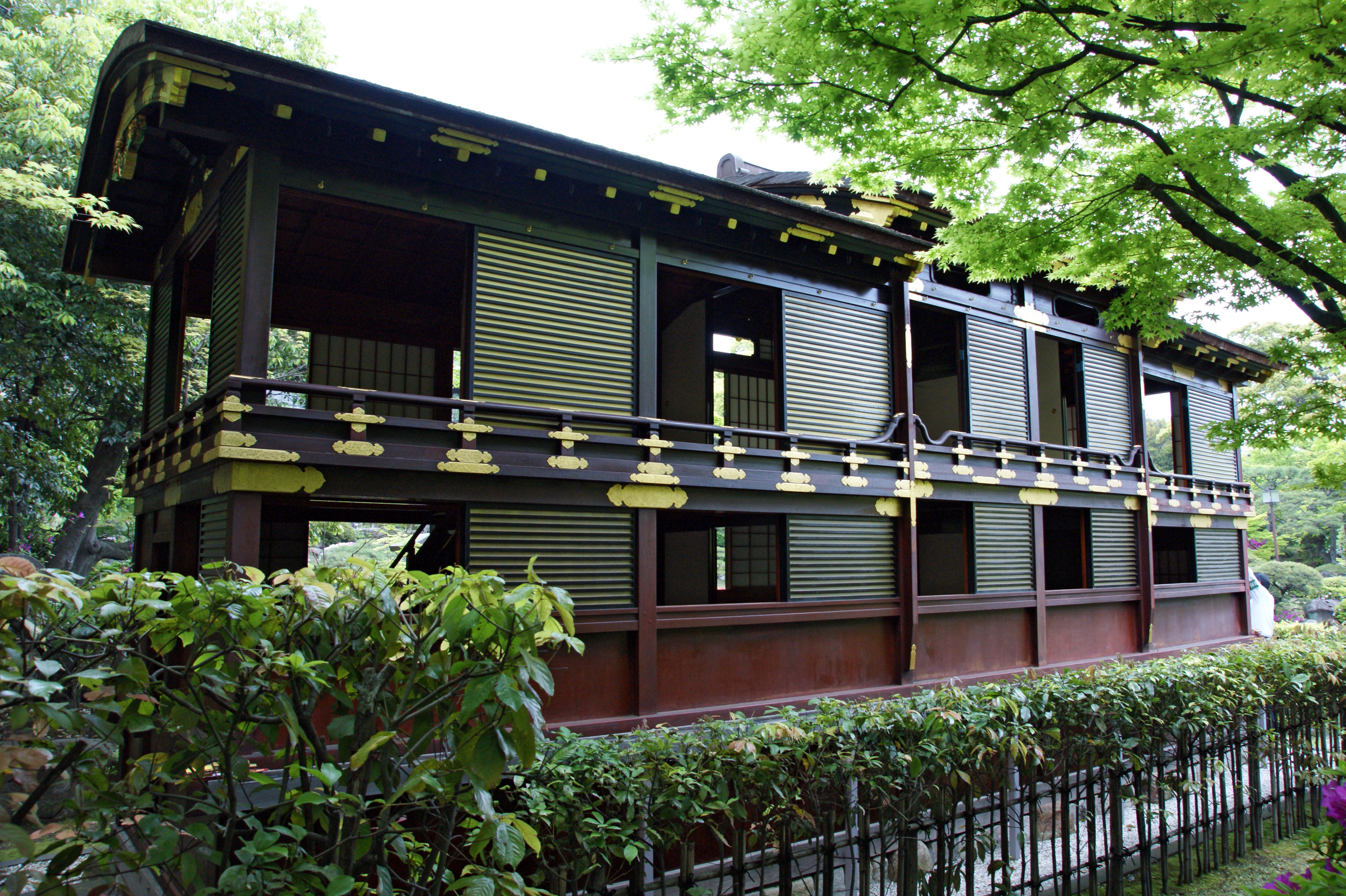 "Funayakata" in Sorakuen, Kobe, Hyogo prefecture, Japan